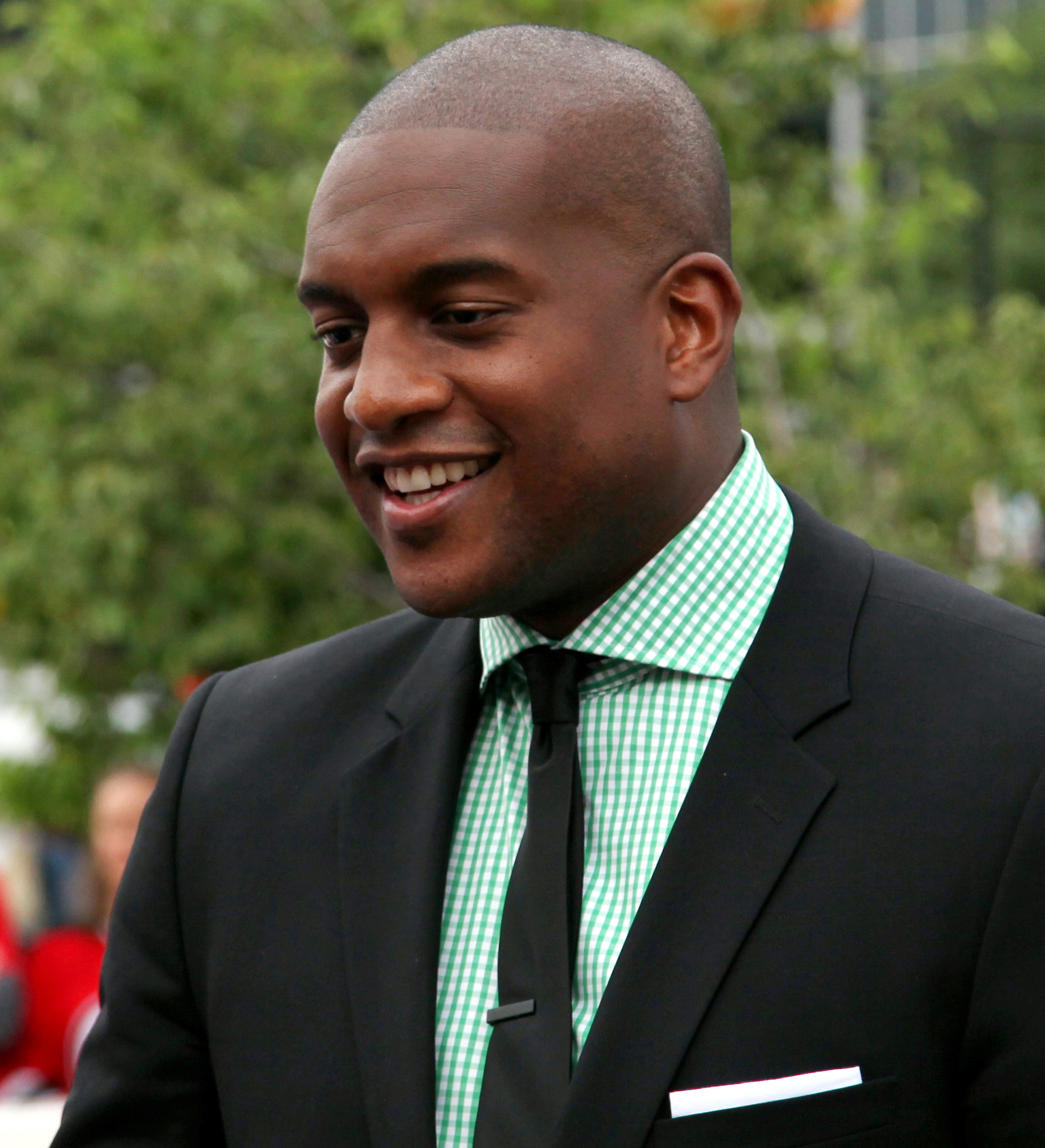 Weekes in Newark, NJ in 2012.